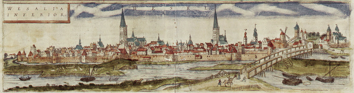 Wesel